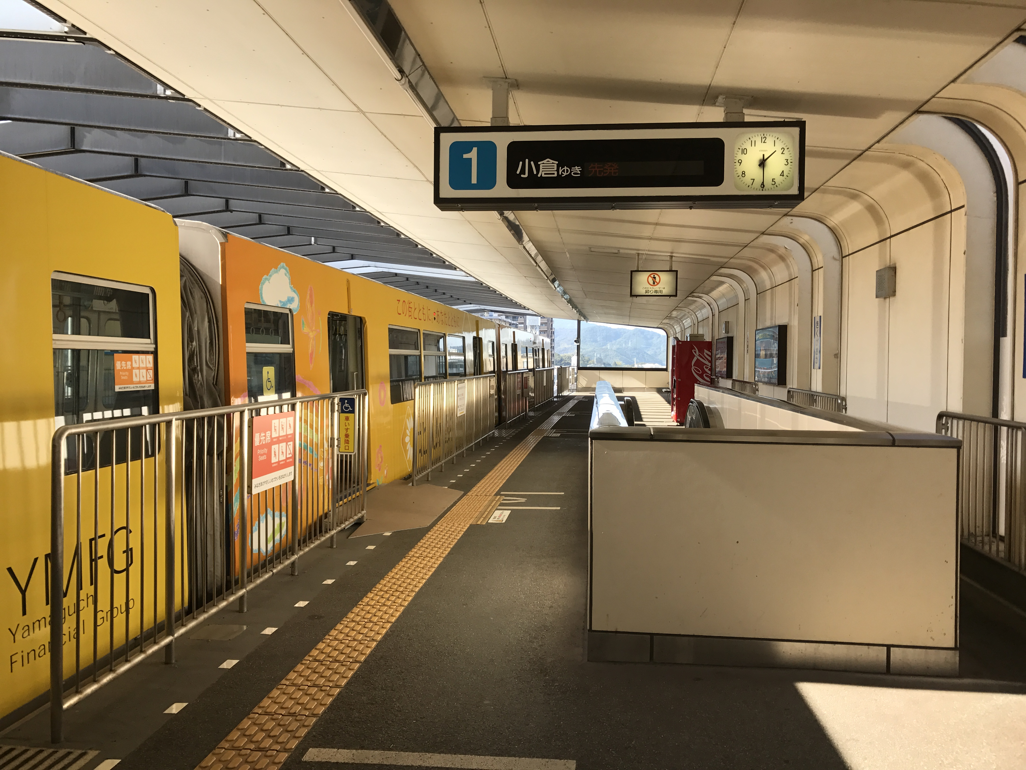 企救丘駅のホーム(奥は志井方面)